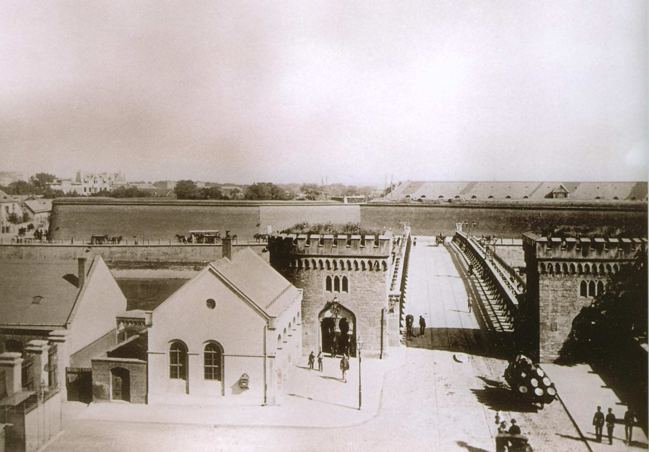 Magdeburg, Blick von der Johannisbergstraße durch das Neue Brücktor über die Elbe zur Zitadelle